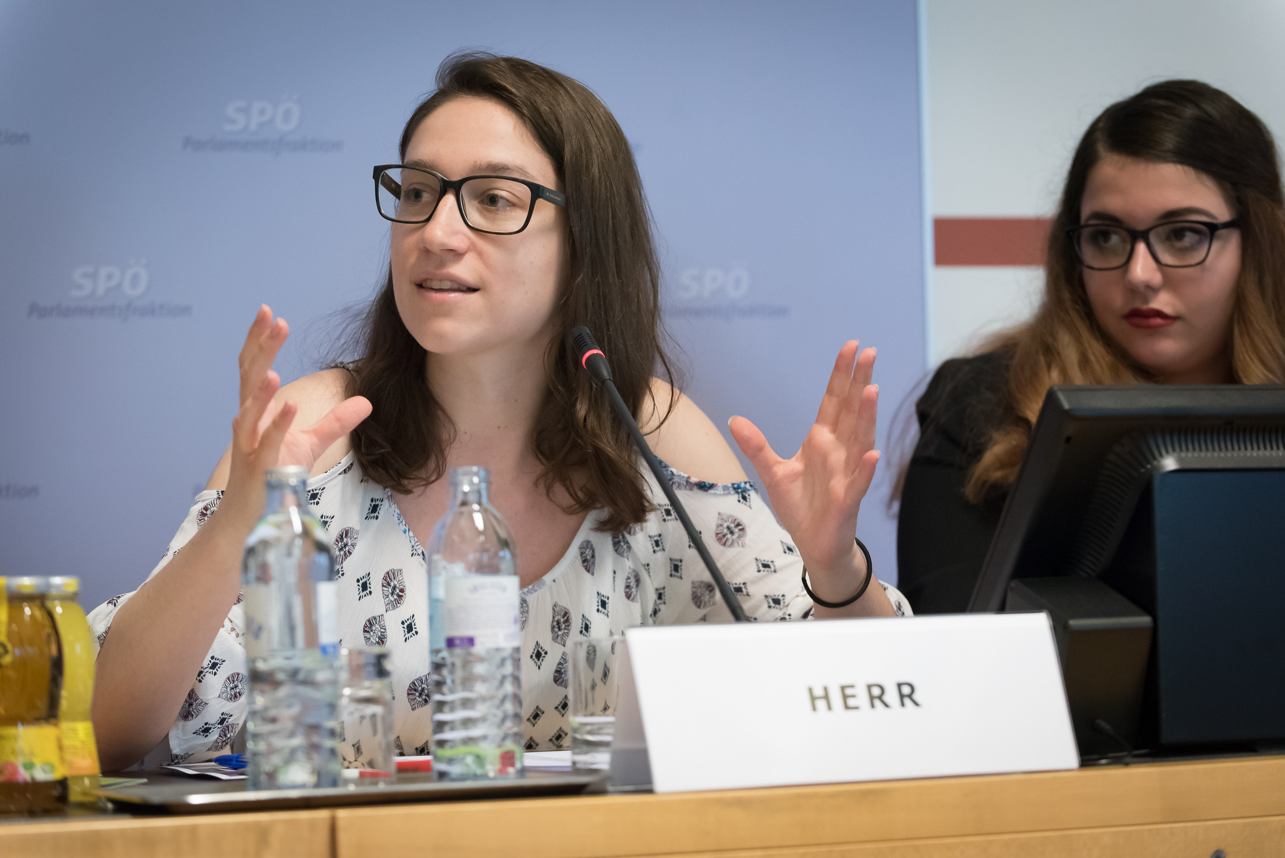 Enquete_NoHateSpeech-492